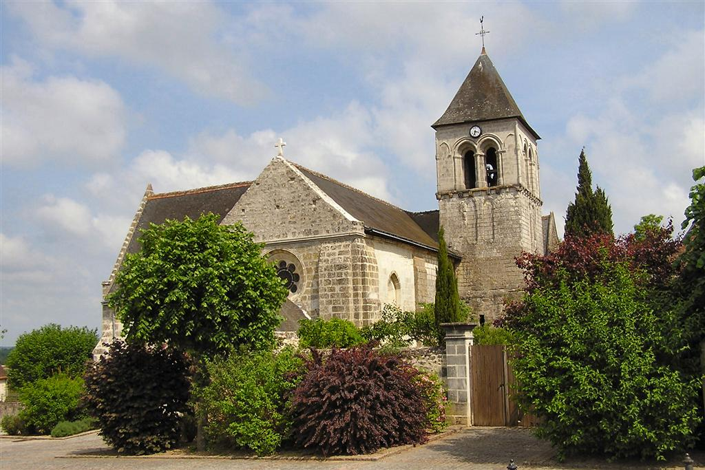 Église de Saché (Touraine)